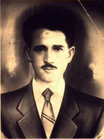 Joaquim Carneiro, político brasileiro.